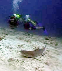 Triaenodon obesus